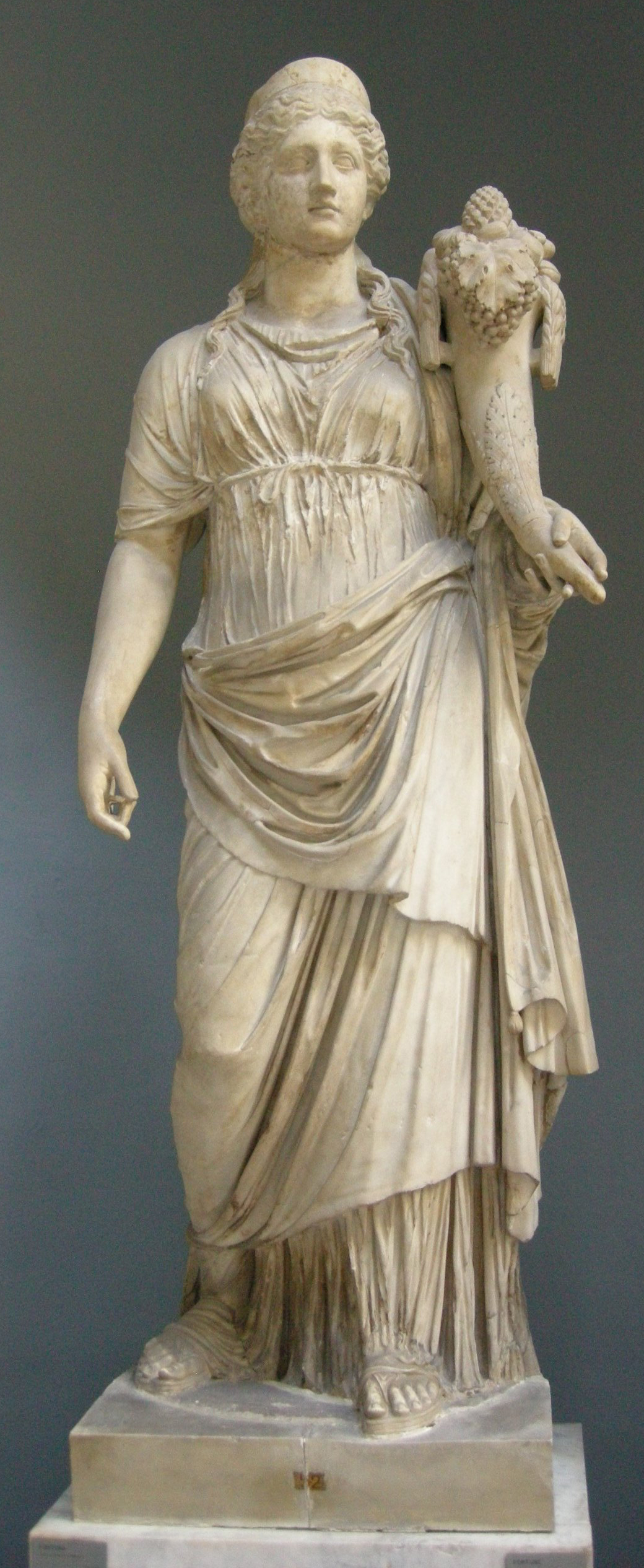 Fortuna, con testa non pertinente, inv. 2262